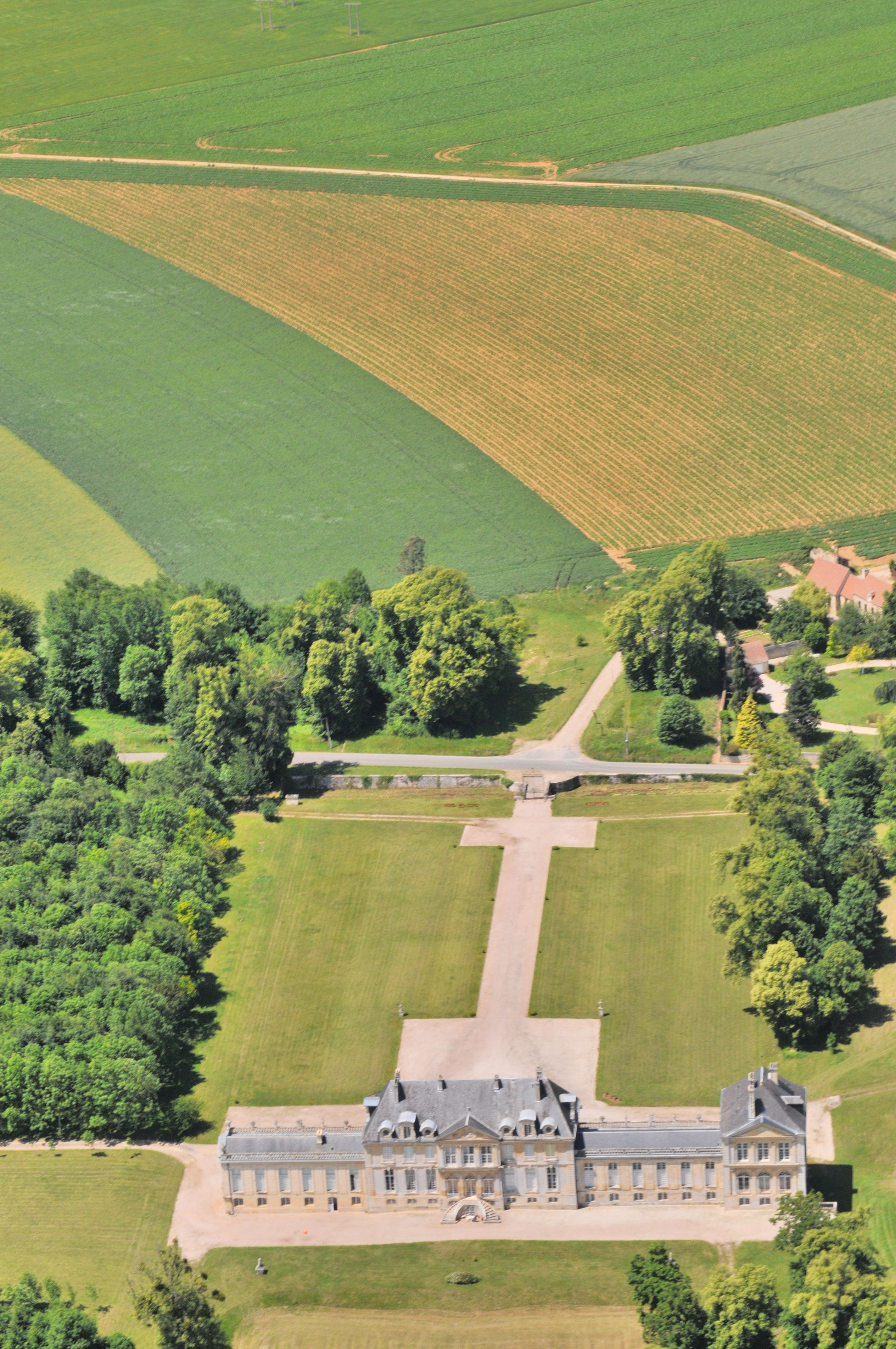 Chateau_versainvllle_calvados_3.JPG